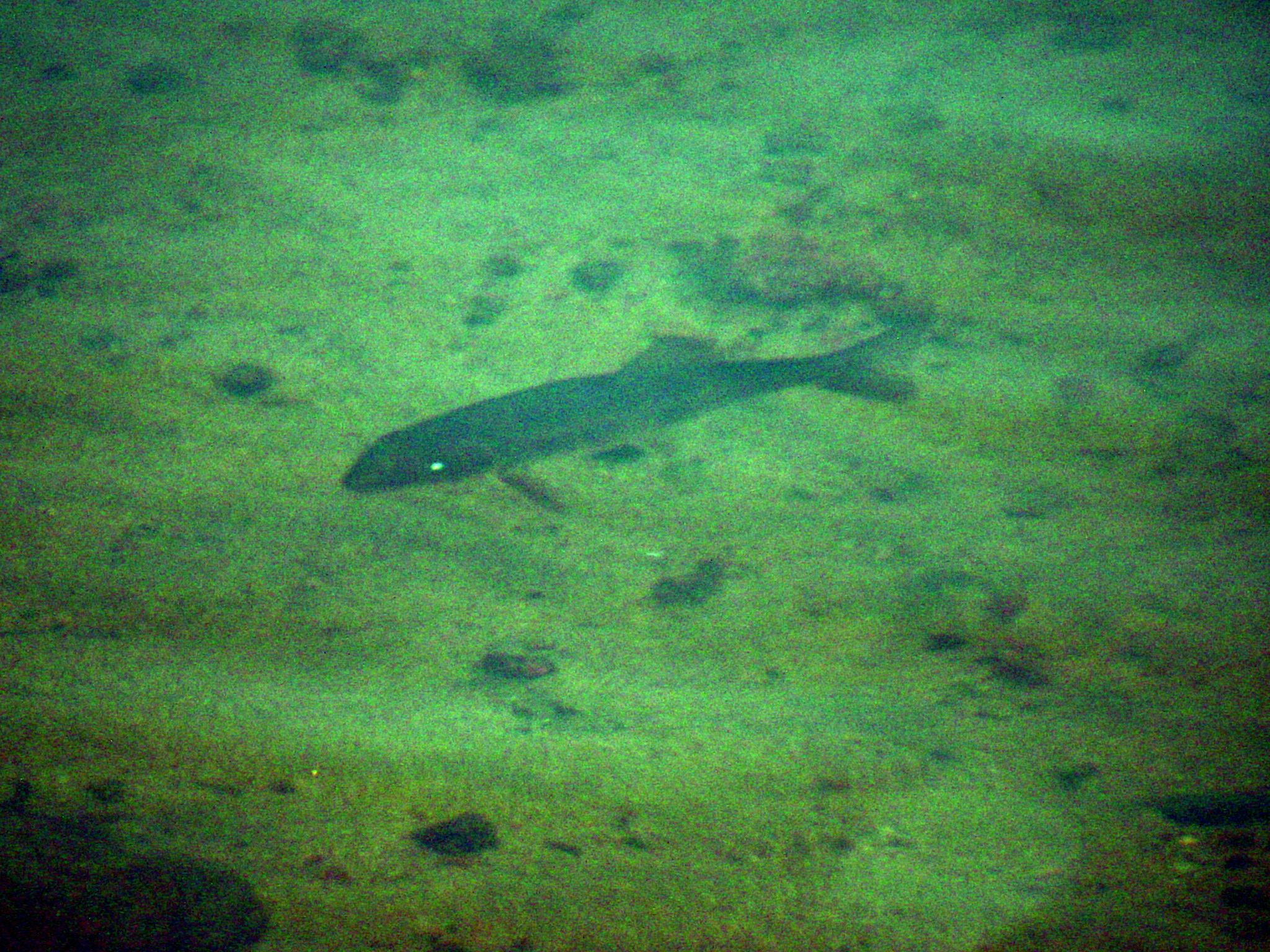 Truite fario dans la Sorgue de la Faible